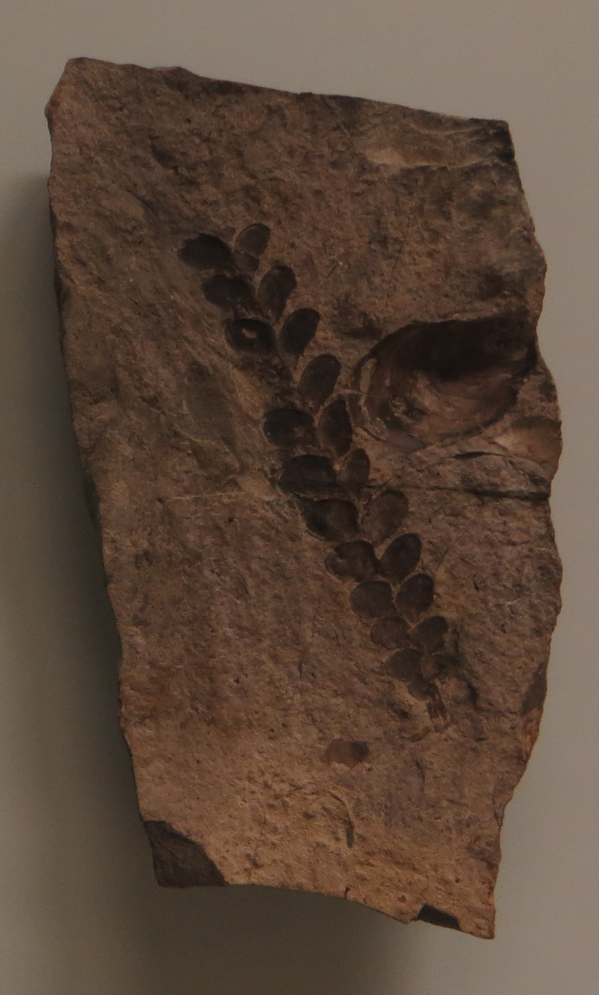 Fossil of plant- Took the picture at Museum am Lowentor, Stuttgart